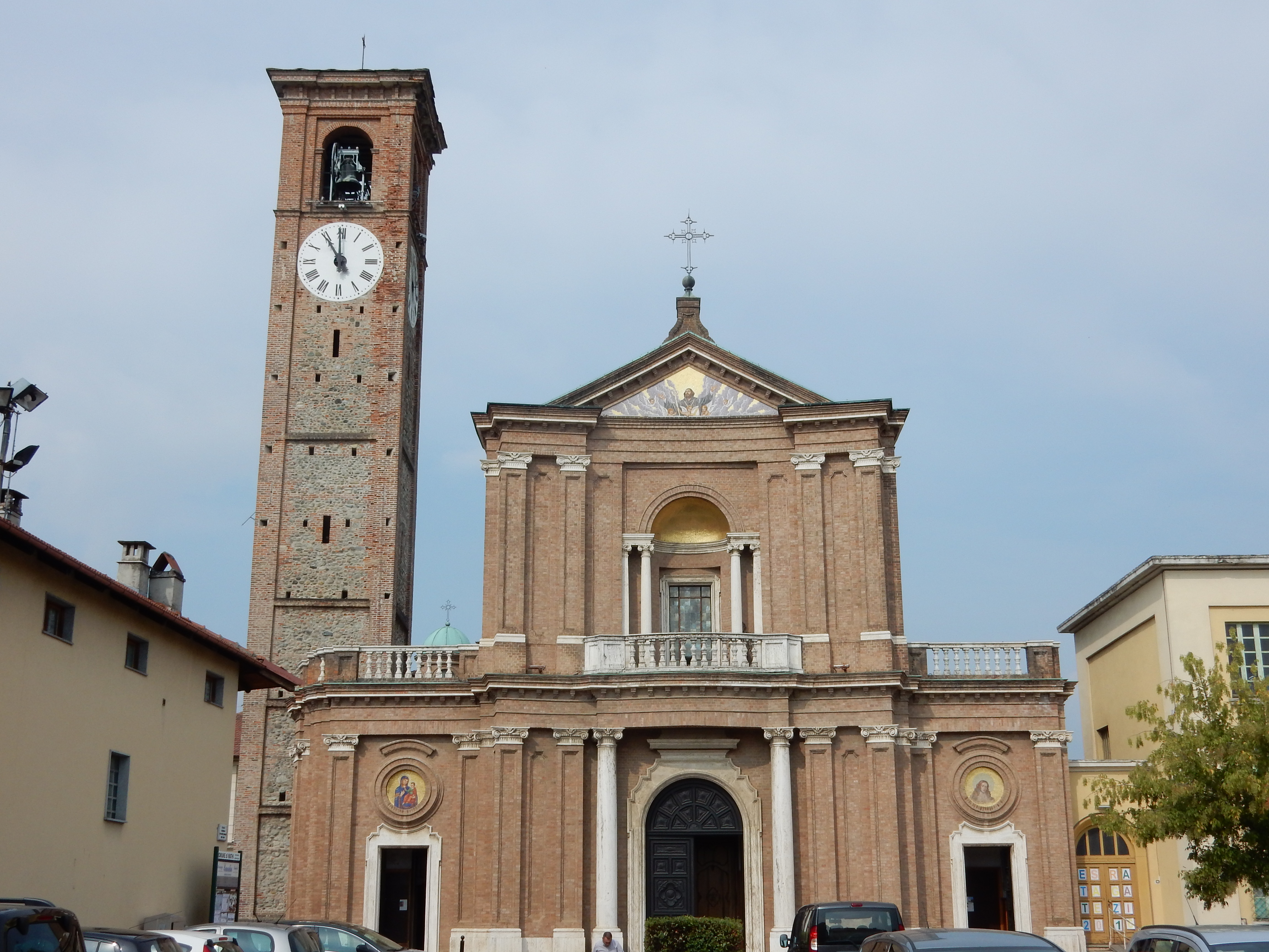 Chiesa parrocchiale di San Mauro